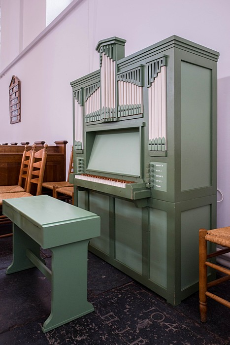 Klein orgel in de Grote Kerk van Nijkerk, gebouwd door Peter Bakker in1992.